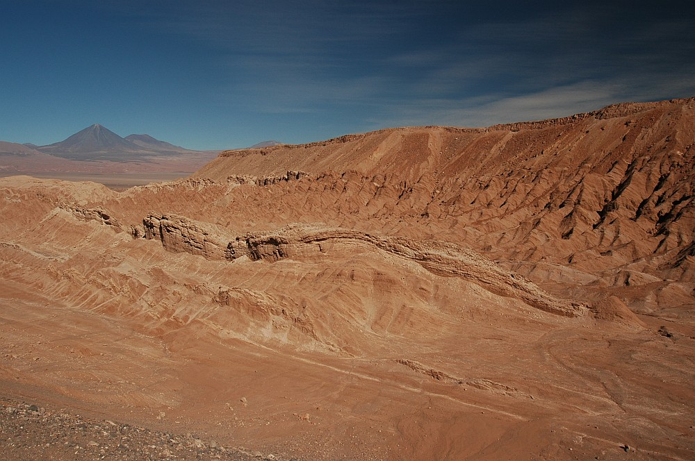 Eine Felsformation in der Nähe von San Pedro de Atacama. Im Hintergrund erkennt man den Volcán Licancabur. Der chilenisch-bolivianische Berg erhebt sich auf 5920m.